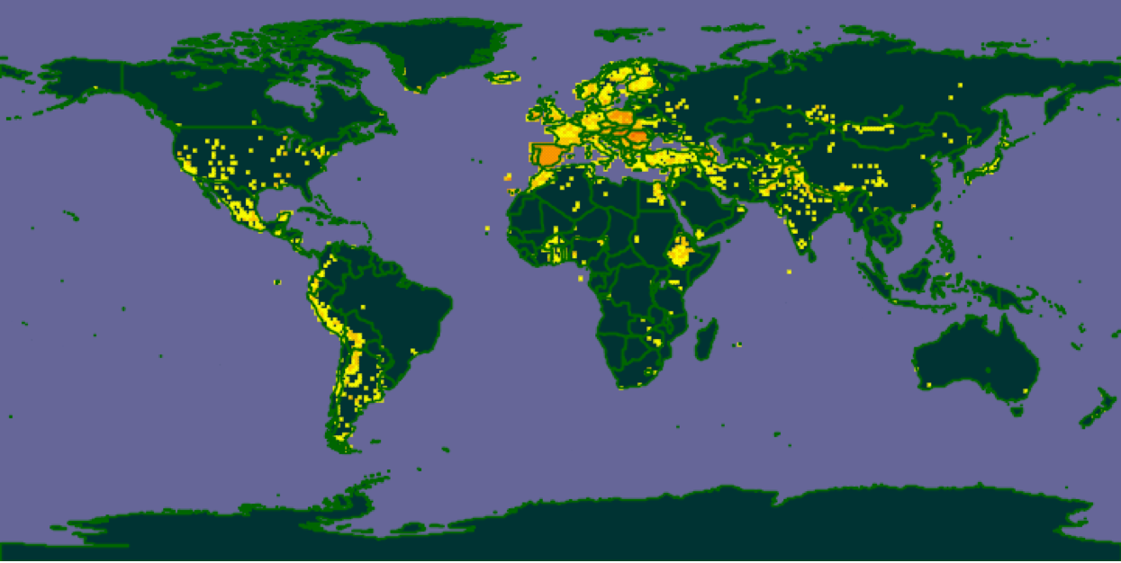 Digitalis Lanata Distribution